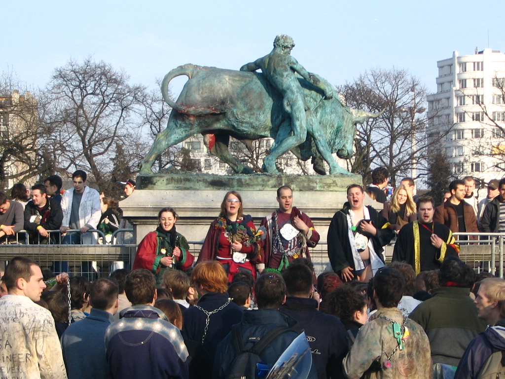 Saint Torè